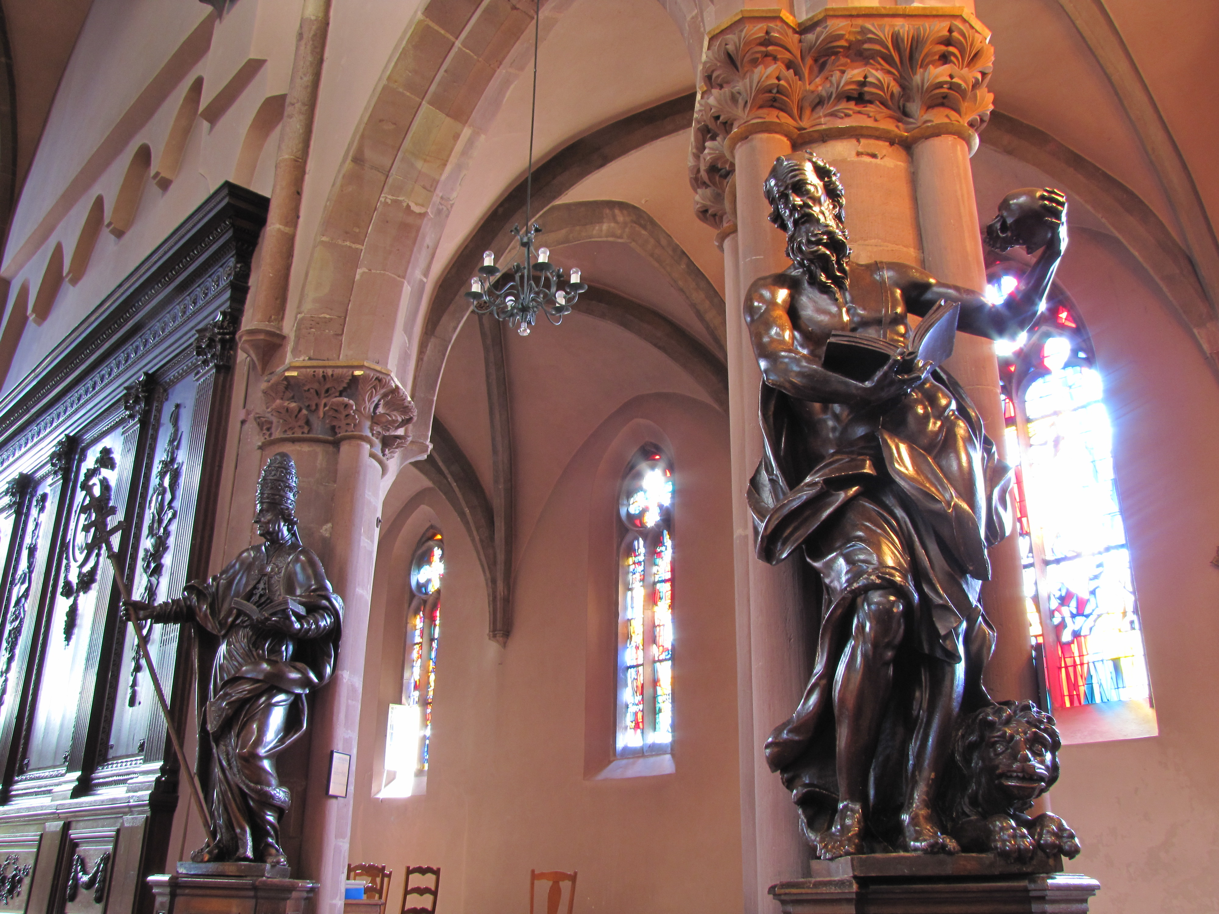 Alsace, Bas-Rhin, Église Saint-Nicolas de Haguenau, (Ancienne église du Couvent des Prémontrés) (PA00084725, IA00061903). Les 4 Pères de l'Église (XVIIIe): St-Grégoire et St-Jérôme. This object is classé Monument Historique in the base Palissy, database of the French furniture patrimony of the French ministry of culture, under the references PM67000600 and IM67002162.